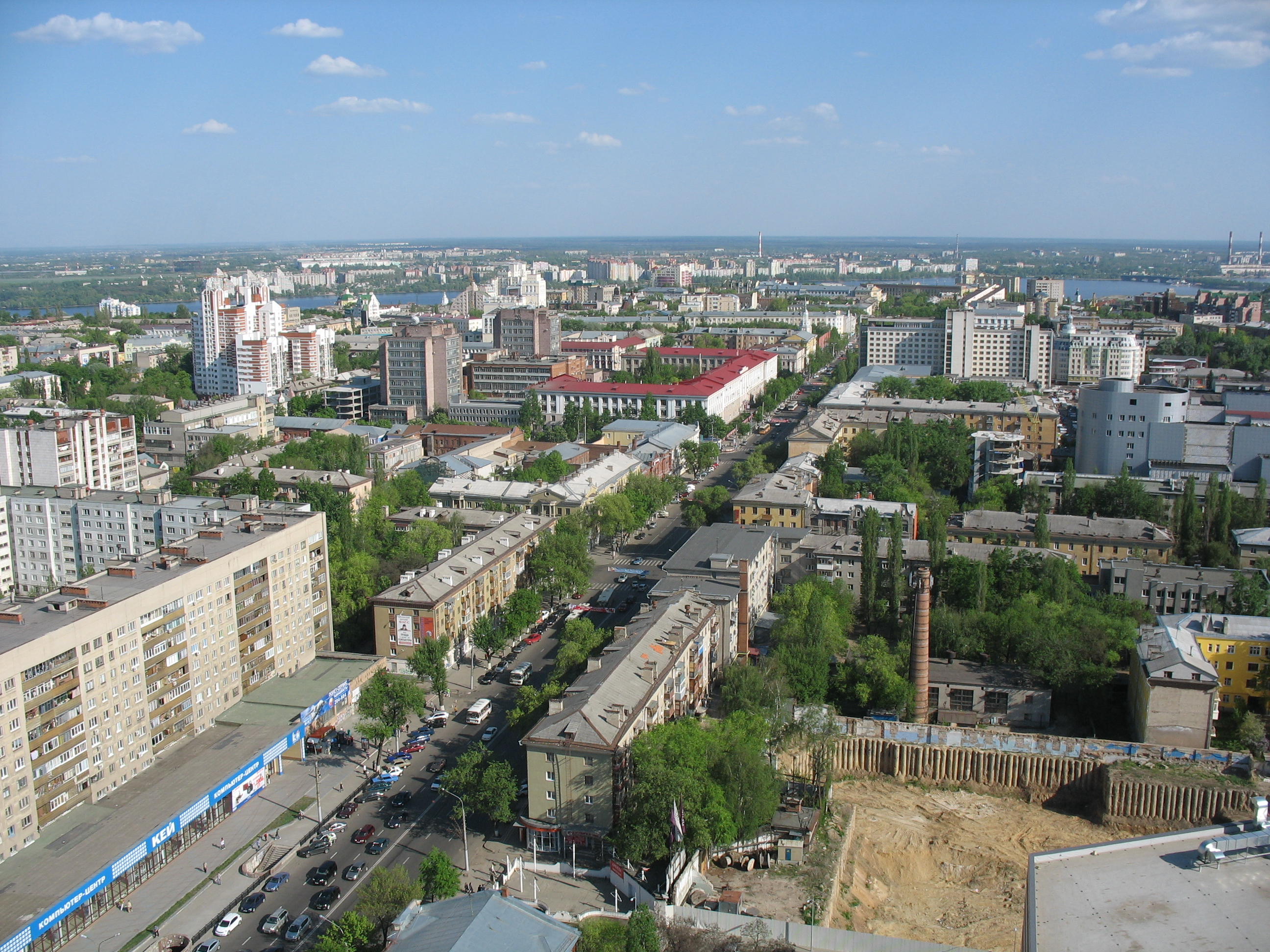 Плехановская улица с Галереи Чижова